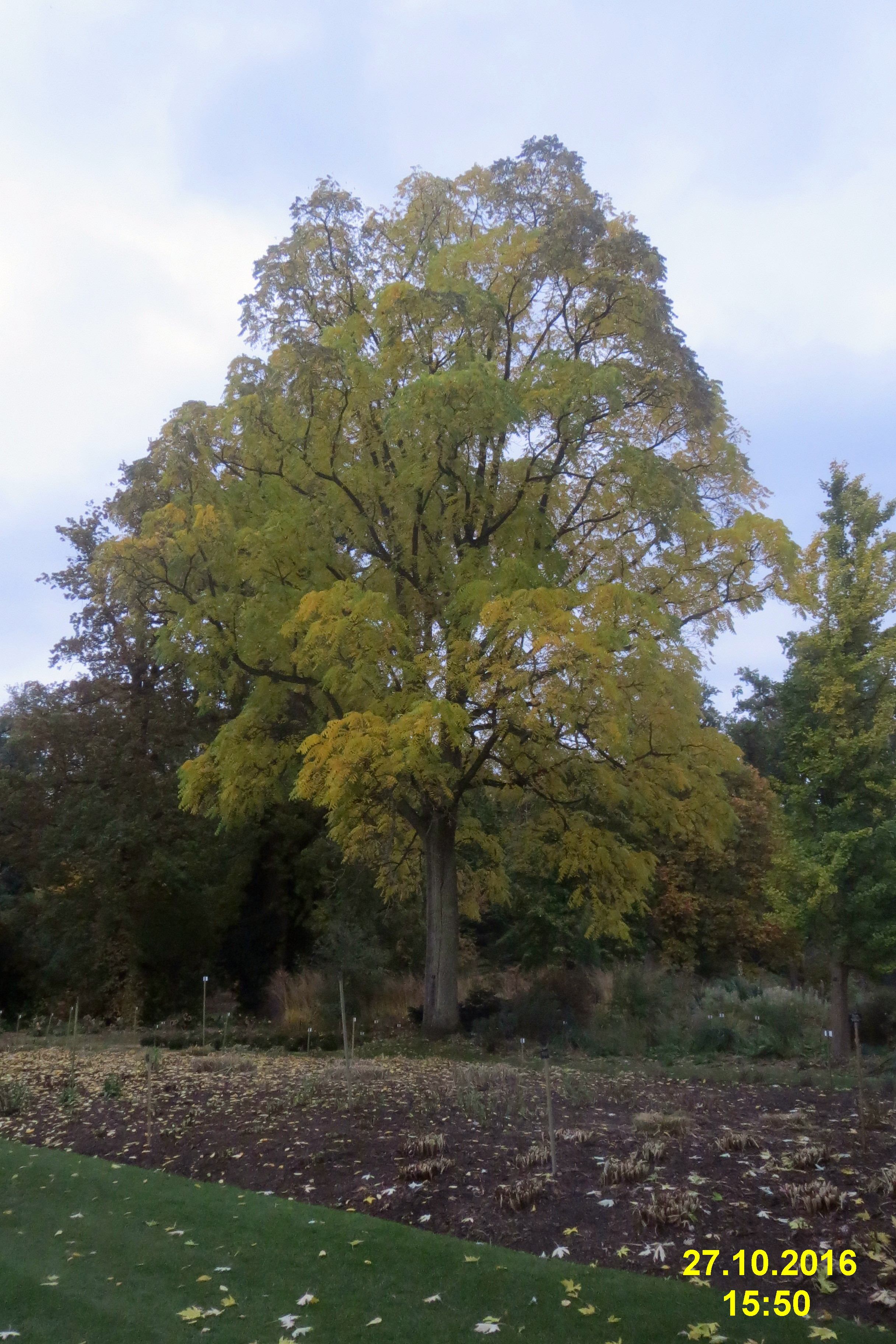 Juglans nigra - ořešák černý.